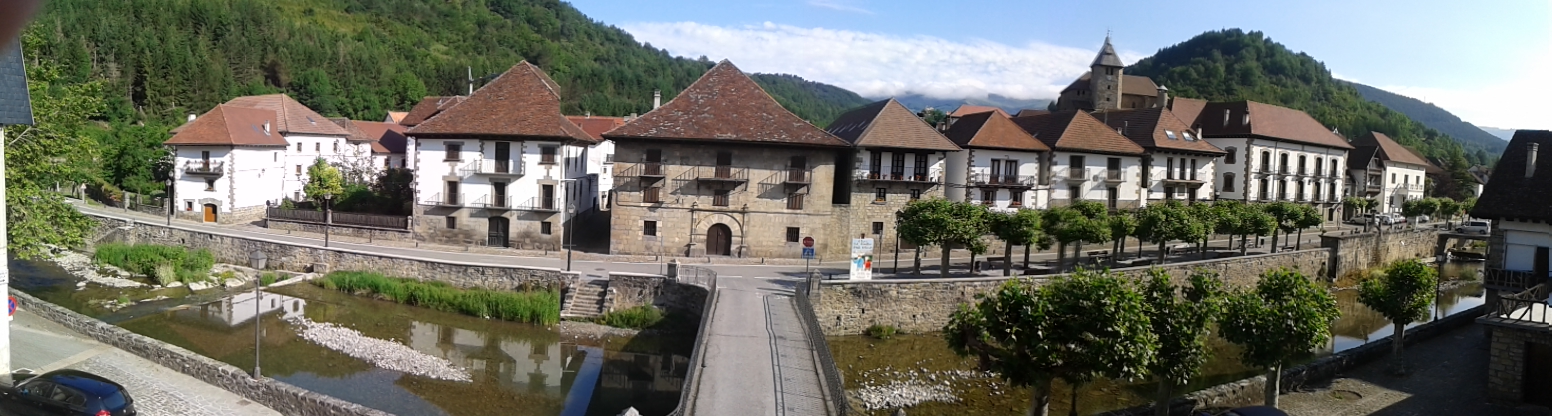 Vista de Ochagavía.